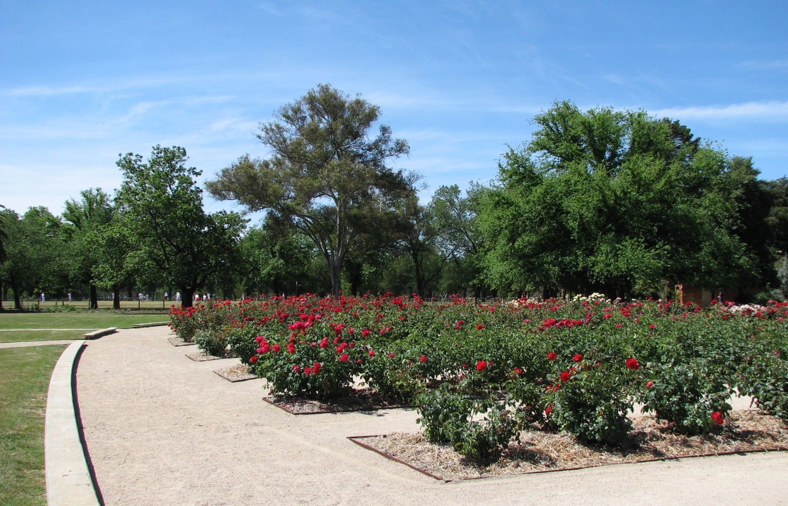 Roses in Benalla Botanic Gardens, Victoria, Australia.